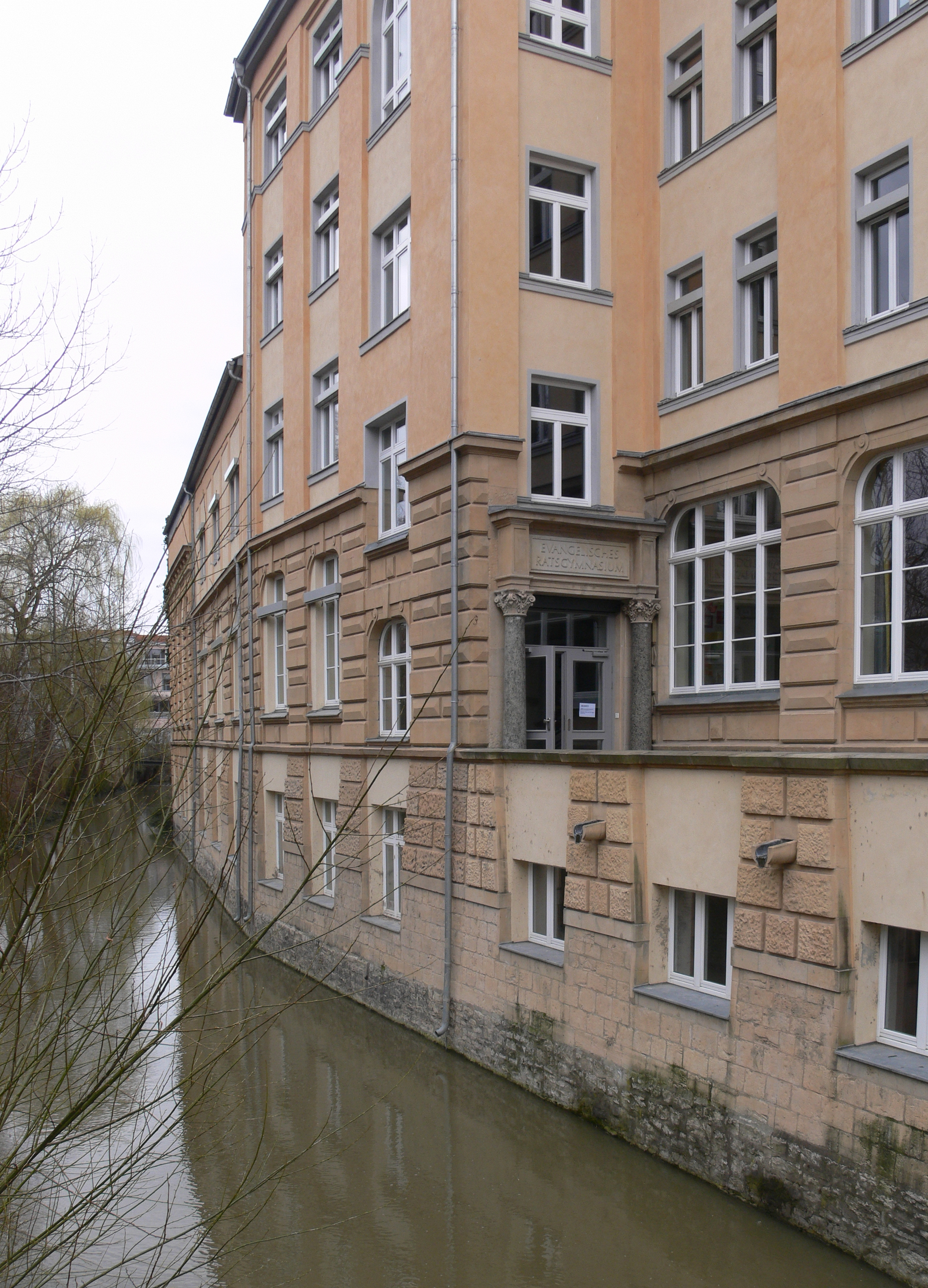 Evangelisches Ratsgymnasium Erfurt, Meister-Eckehart-Straße Nebenhaus (Haus am Breitstrom), ehemals "Haus der Kultur"